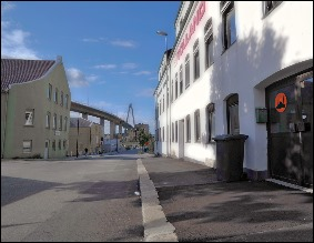 Eyup Sultan moskee i Storhaug